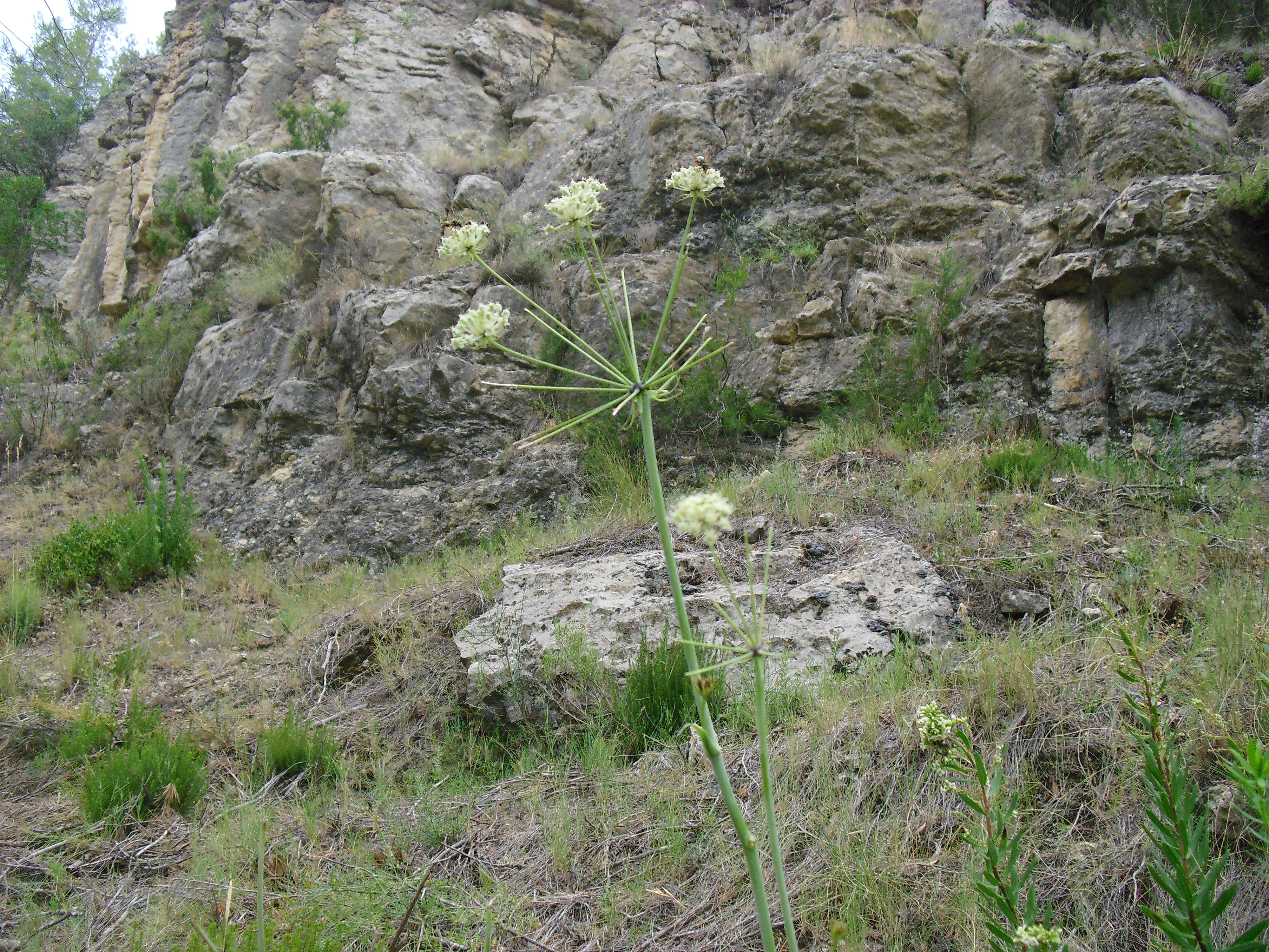 Guillonea scabra